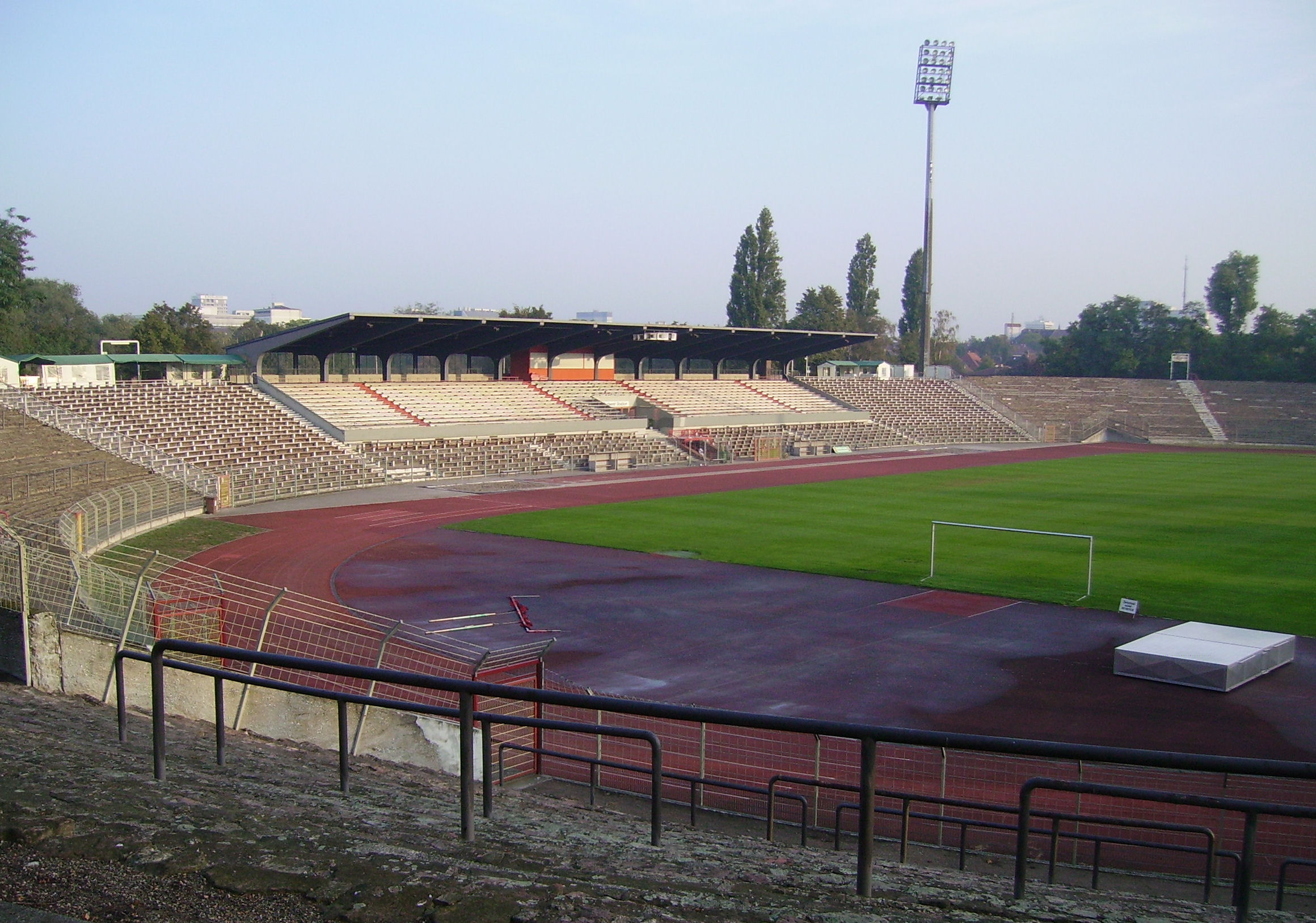 Südwest-Stadion of Ludwigshafen in Rhineland-Palatinate (Germany)